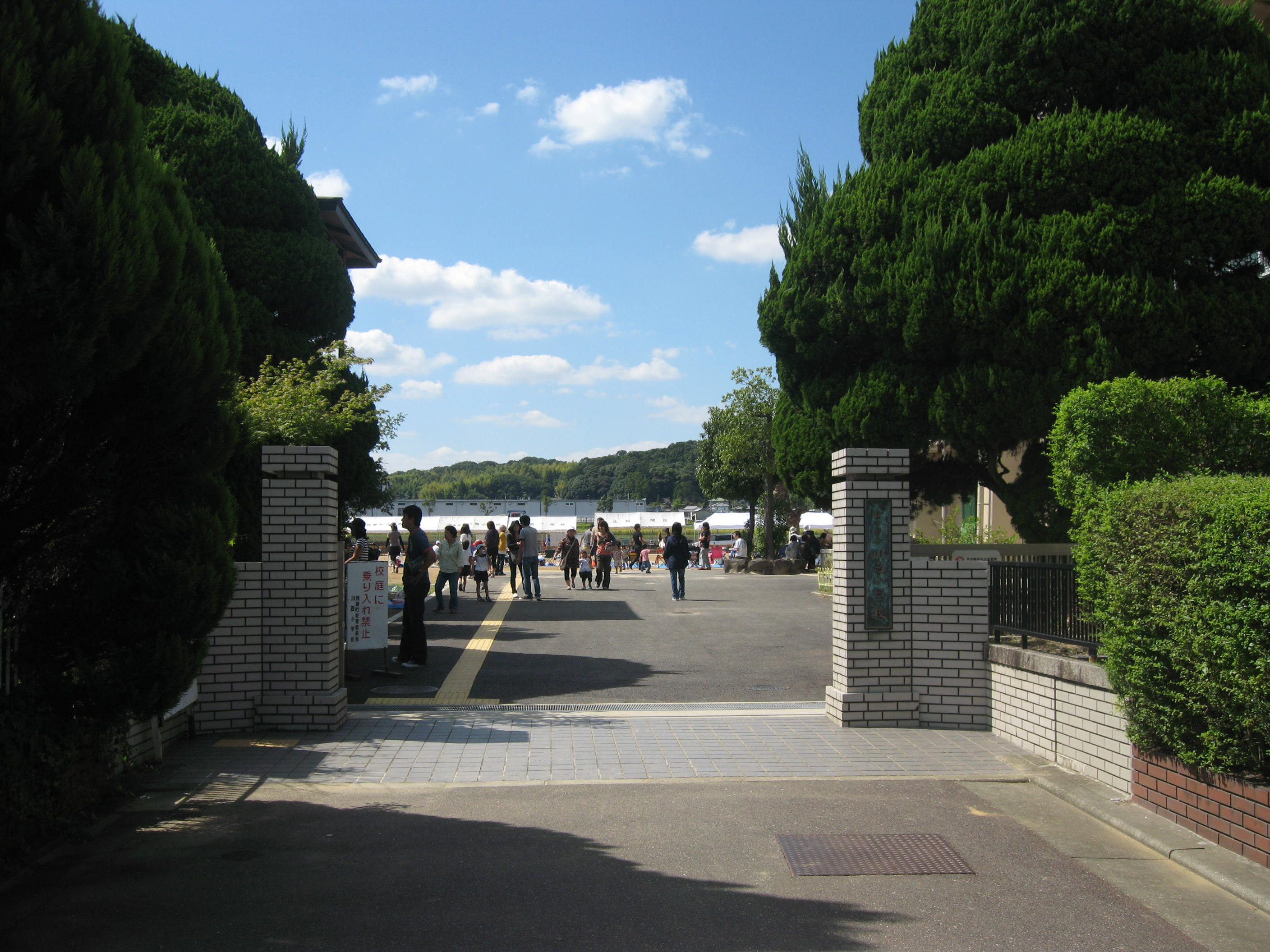 2011年9月24日に精華町立川西小学校を東側から撮影した画像